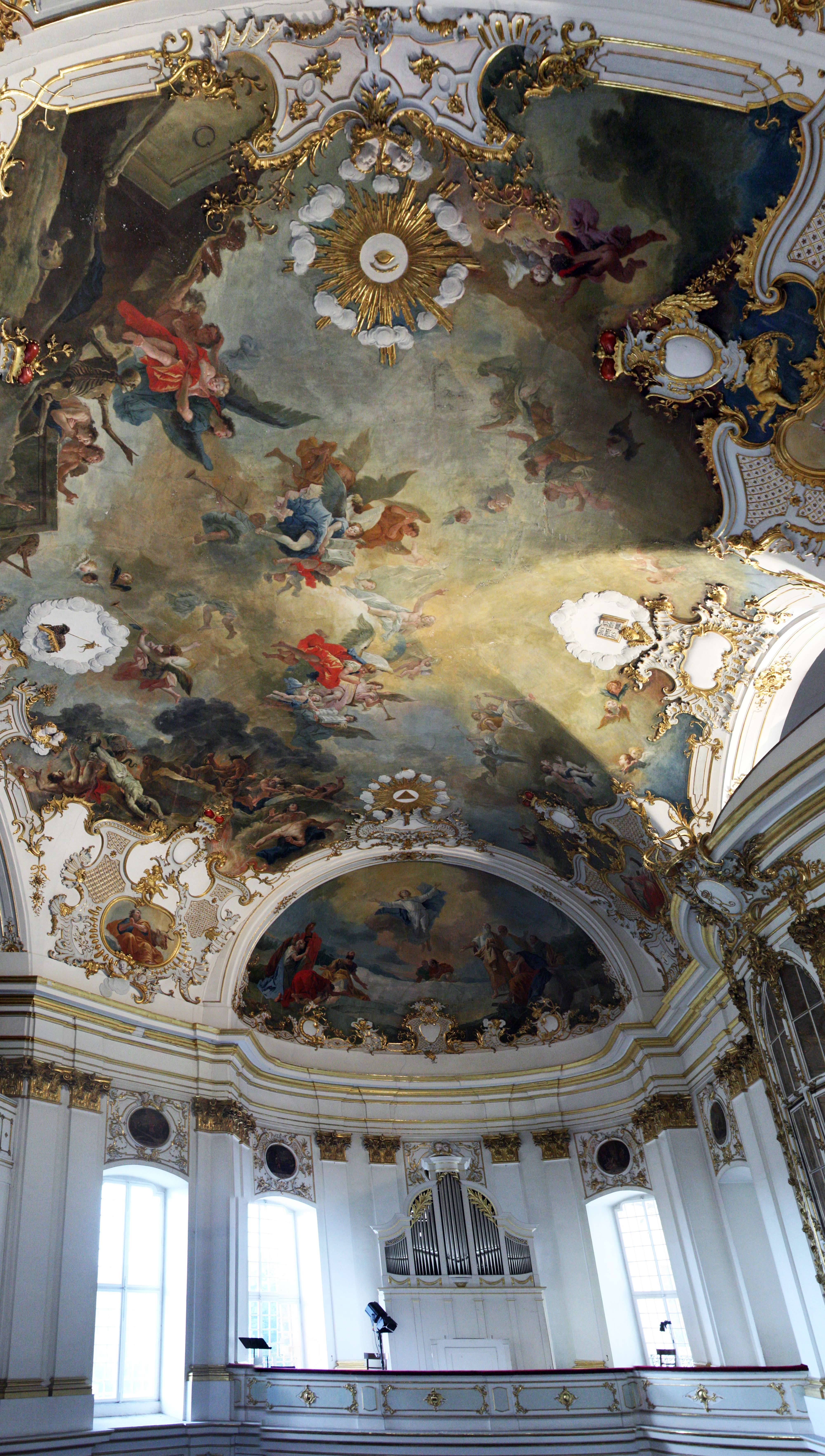 Ordenskapelle und evangelische Schlosskirche im Residenzschloss Ludwigsburg. Das Deckengemälde der Ordenskapelle wurde von Livio Retti im Jahr 1747 erstellt.